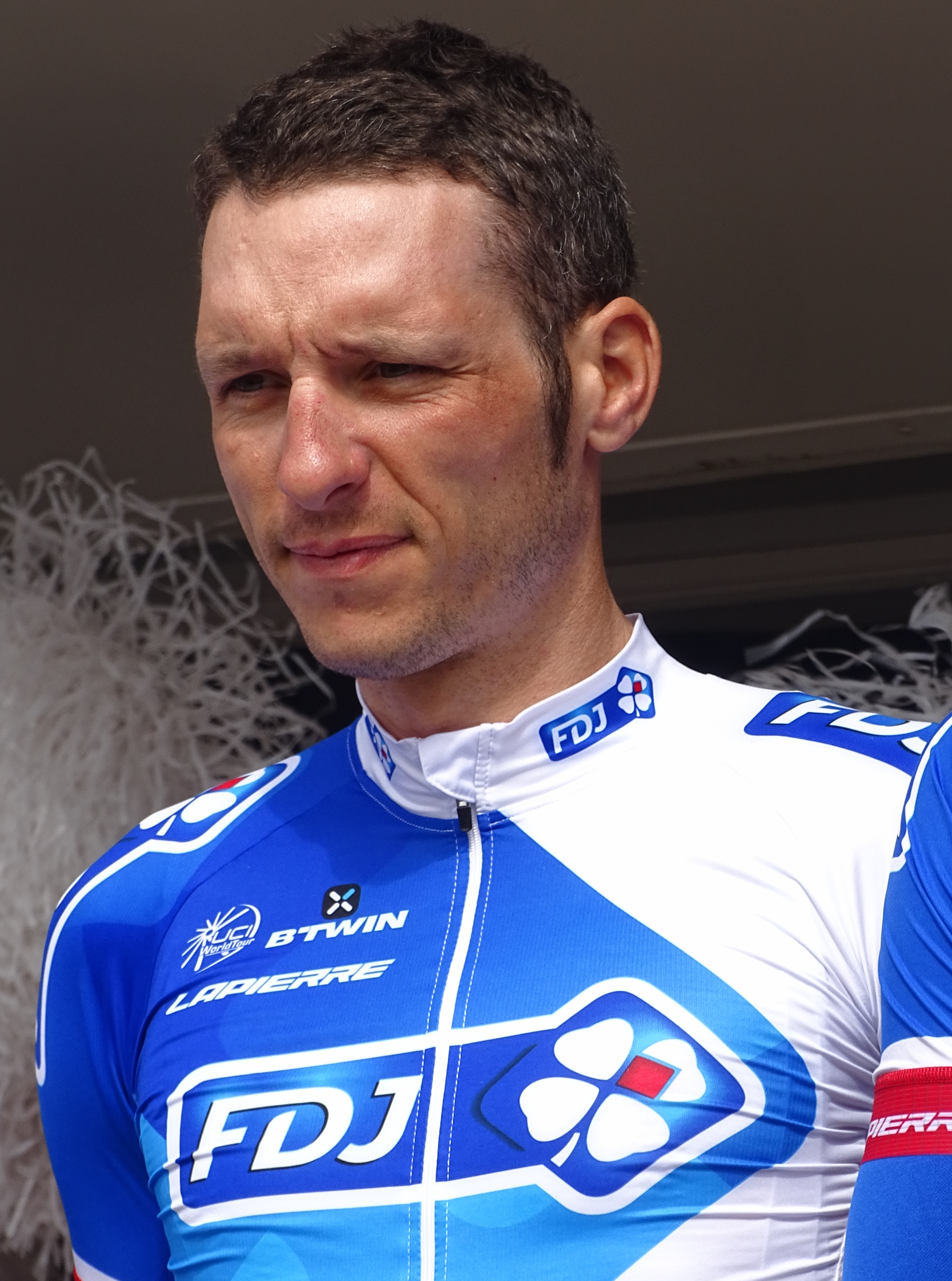 Reportage réalisé le jeudi 16 avril à l'occasion du départ et de l'arrivée du Grand Prix de Denain 2015 à Denain, Nord, Nord-Pas-de-Calais, France.